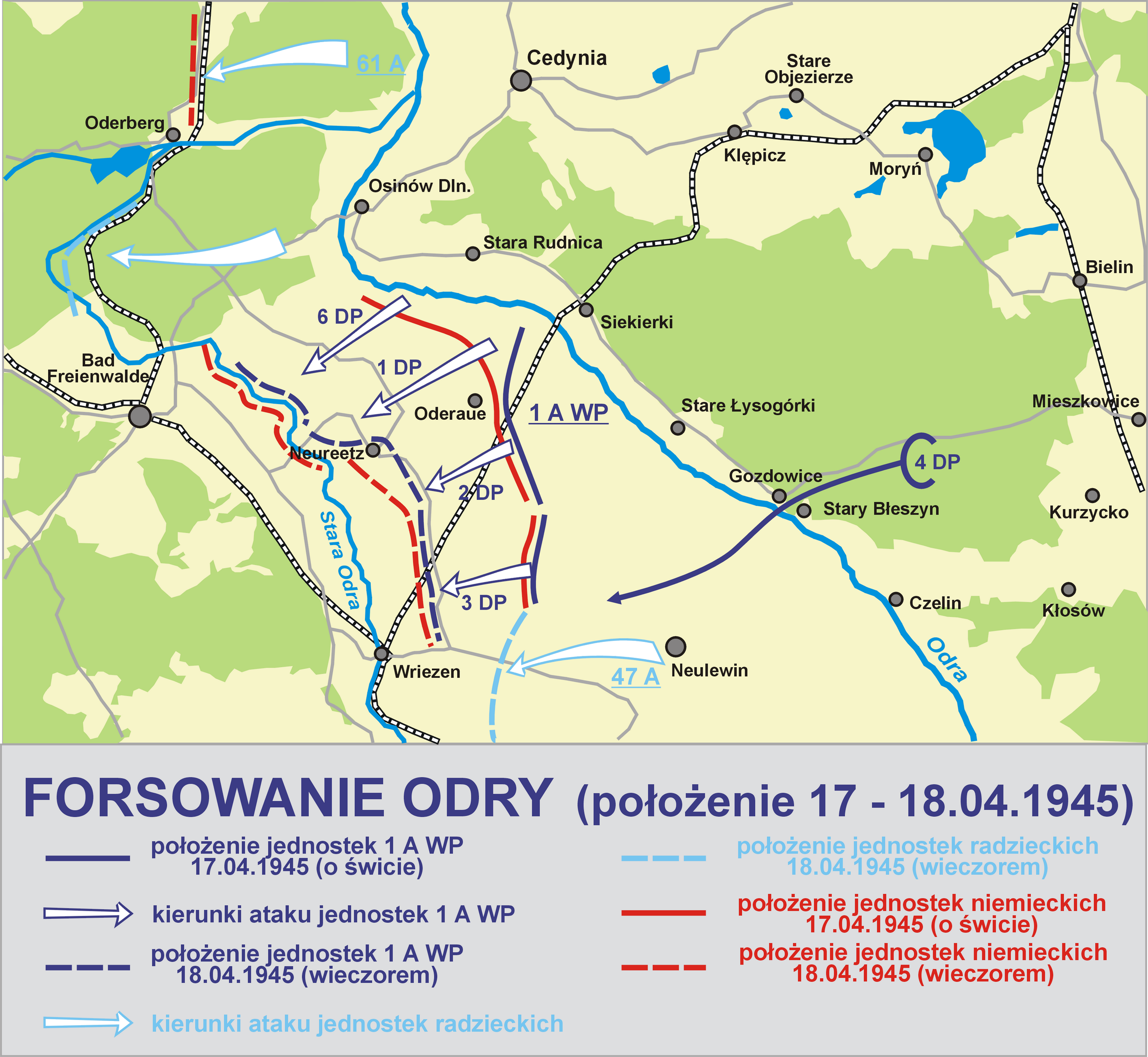 Forsowanie Odry położenie 17-18.04.1945